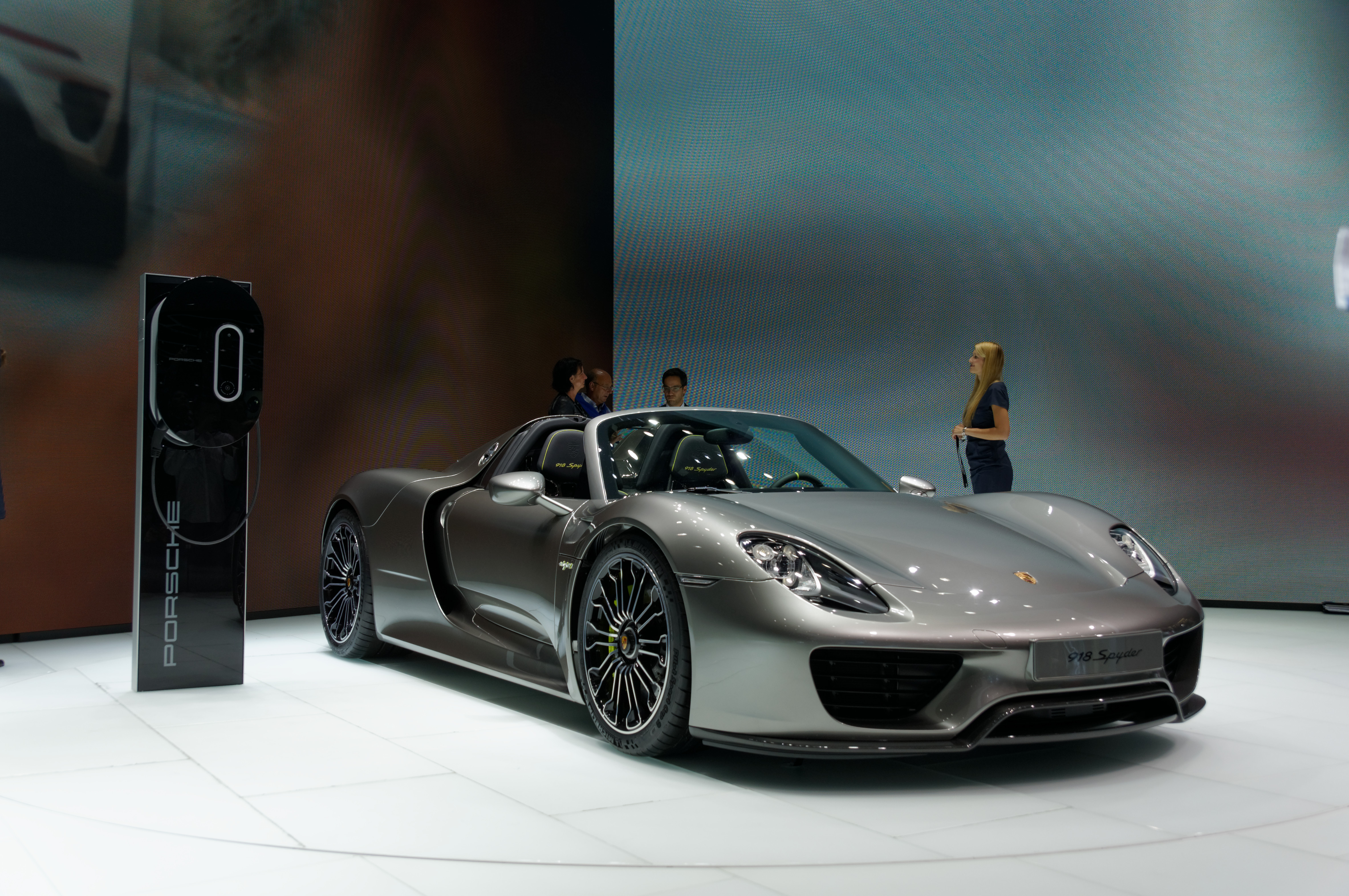 DSC01986_DxO